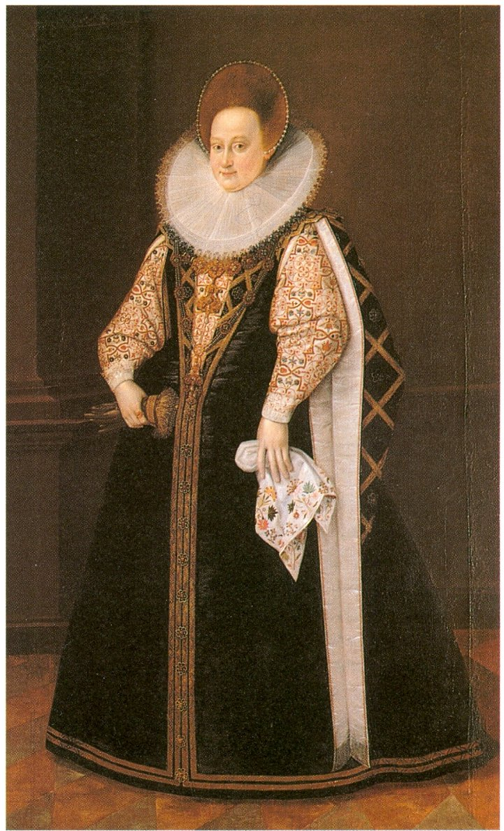 Sibylla von Anhalt (1564-1614), Gattin Herzog Friedrich I. von Württemberg